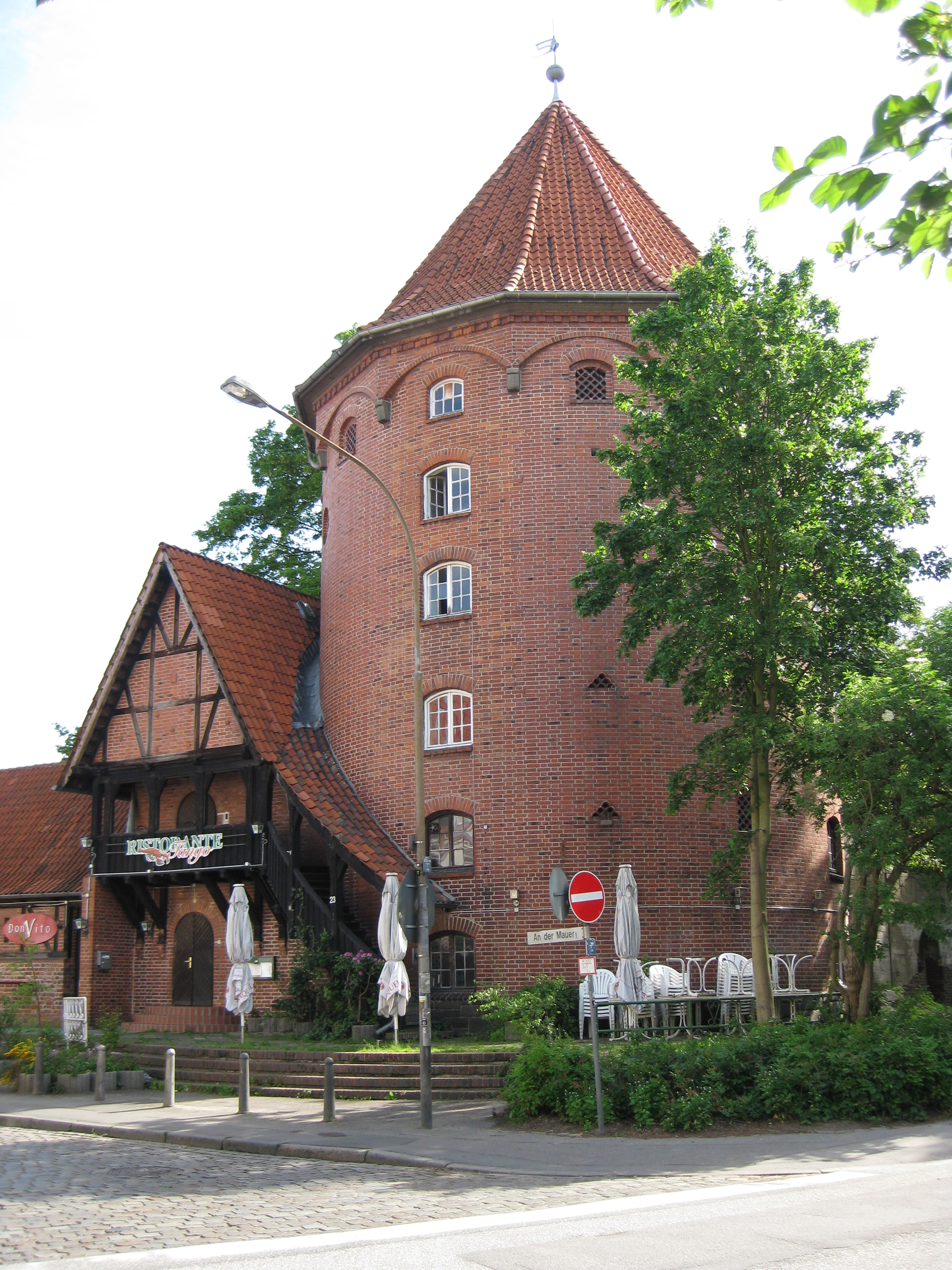 Bunker in Lübeck, Krähenstraße/Ecke An der Mauer/Rehder-Brücke, aus dem 2. WK im Stil der mittelalterlichen Stadtbefestigung, heute Restaurant.